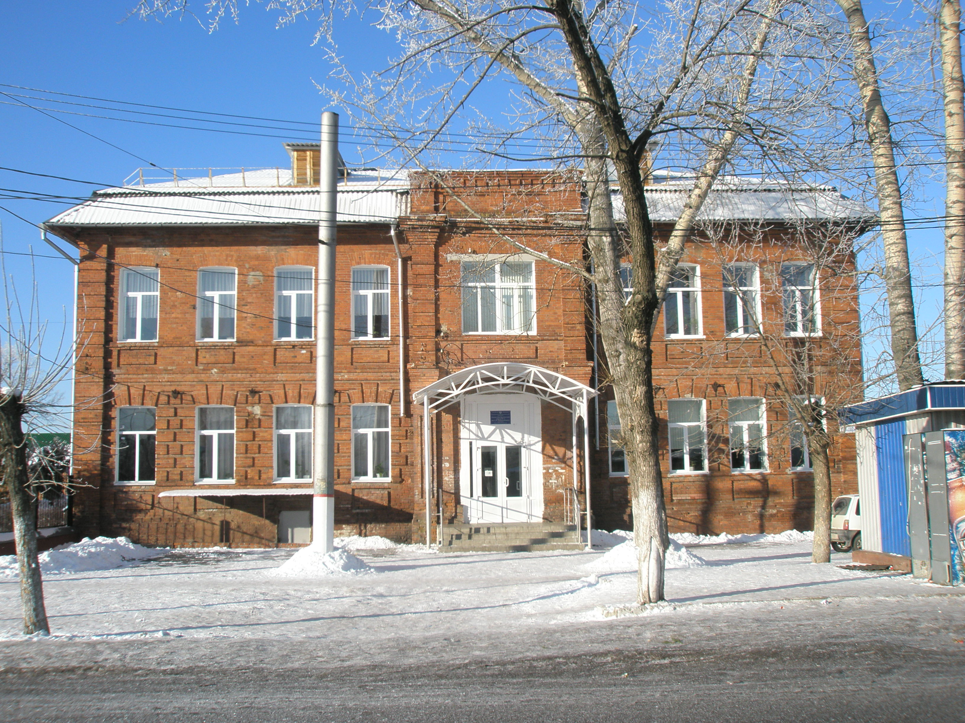 Школа №12 им. С.Н. Перекальского в г. Курске. Корпус начальных классов. Январь 2011 г.